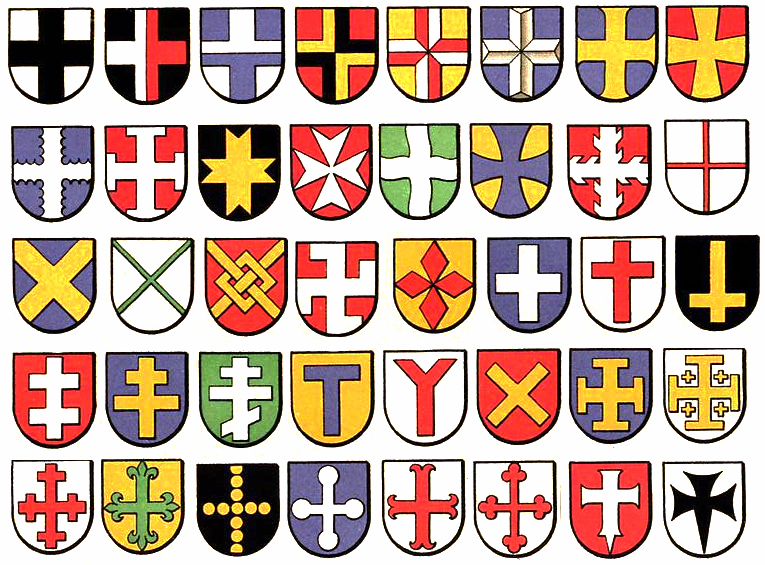 Heraldische Kreuze nach Ströhl (1909): 1. Reihe: 1. Kreuz, 2. gespaltenes Kreuz, 3. geteiltes Kreuz, 4. geviertes Kreuz, 5. gständertes Kreuz, 6. facettiertes Kreuz, 7. geradarmiges Tatzenkreuz, 8. Ständerkreuz. 2. Reihe: 9. Dornen- oder Reifenkreuz, 10. Krückenkreuz, 11. gekerbtes Kreuz, 12. Malteserkreuz, 13. Wellenkreuz, 14. Tatzenkreuz, 15. Astkreuz, 16. Fadenkreuz. 3. Reihe: 17. Andreaskreuz oder Schragen, 18. Fadenschrägkreuz, 19. Knotenkreuz (engl. Frette), 20. Halbkrückenkreuz, 21. Rautenkreuz, 22. schwebendes oder gemeines Kreuz, 23. Hoch- oder Passionskreuz, 24. Petruskreuz (quer gelegt: Philippskreuz). 4. Reihe: 25. Lothringerkreuz, 26. Patriarchenkreuz, 27. russisches Kreuz, 28. Antoniuskreuz (Taukreuz), 29. Schächerkreuz, 30. schwebendes Andreaskreuz, 31. schwebendes Krückenkreuz, 32. Jerusalemerkreuz. 5. Reihe: 33. schwebendes Wiederkreuz, 34. Lilienkreuz, 35. Kugel- oder Münzenkreuz, 36. Kolbenkreuz, 37. Ankerkreuz, 38. Lazarus- oder Kleeblattkreuz, 39. Nagelspitzsteckkreuz, 40. Tatzenstreckkreuz. Weitere Kreuzformen giebt M. Gritzner in seiner 'Heraldischen Terminologie', in Siebmachers grossem Wappenbuch, 1890, und Detlev Frhr. v. Biedermann in seiner Monographie über 'Die Kreuze in der Heraldik', Jahrbuch des 'Adlers', Wien 1874.